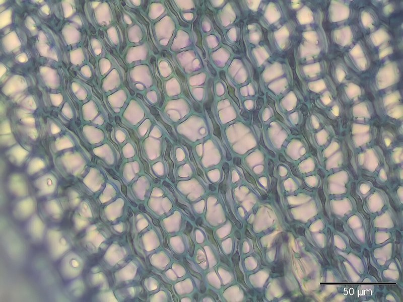 Sphagnum subnitens, Astblatt-Zellen, 400x